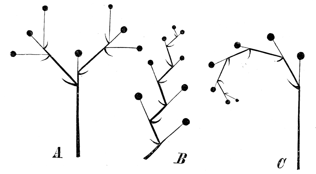 Different types of Inflorescences. Arten cymöser Blütenstände: A Dichasium, B Wickel, C Schraubel